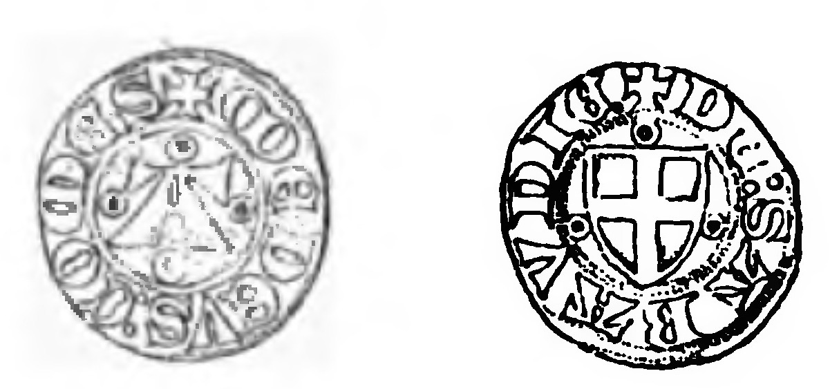 "Rivista italiana di numismatica", a numismatic magazin of "Società Numismatica Italiana"